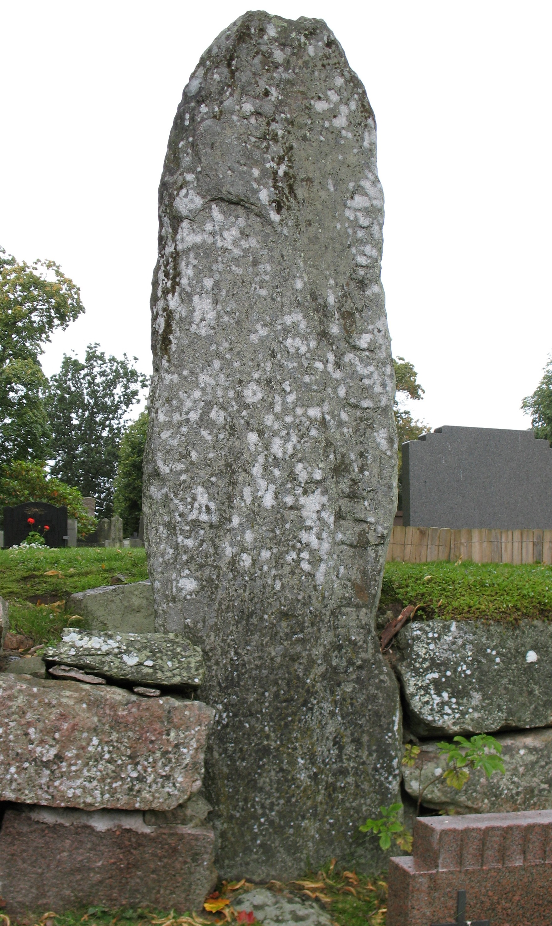 runestone, "Toste reste stenen efter Gunne, sin frände, ... västerut blev..."